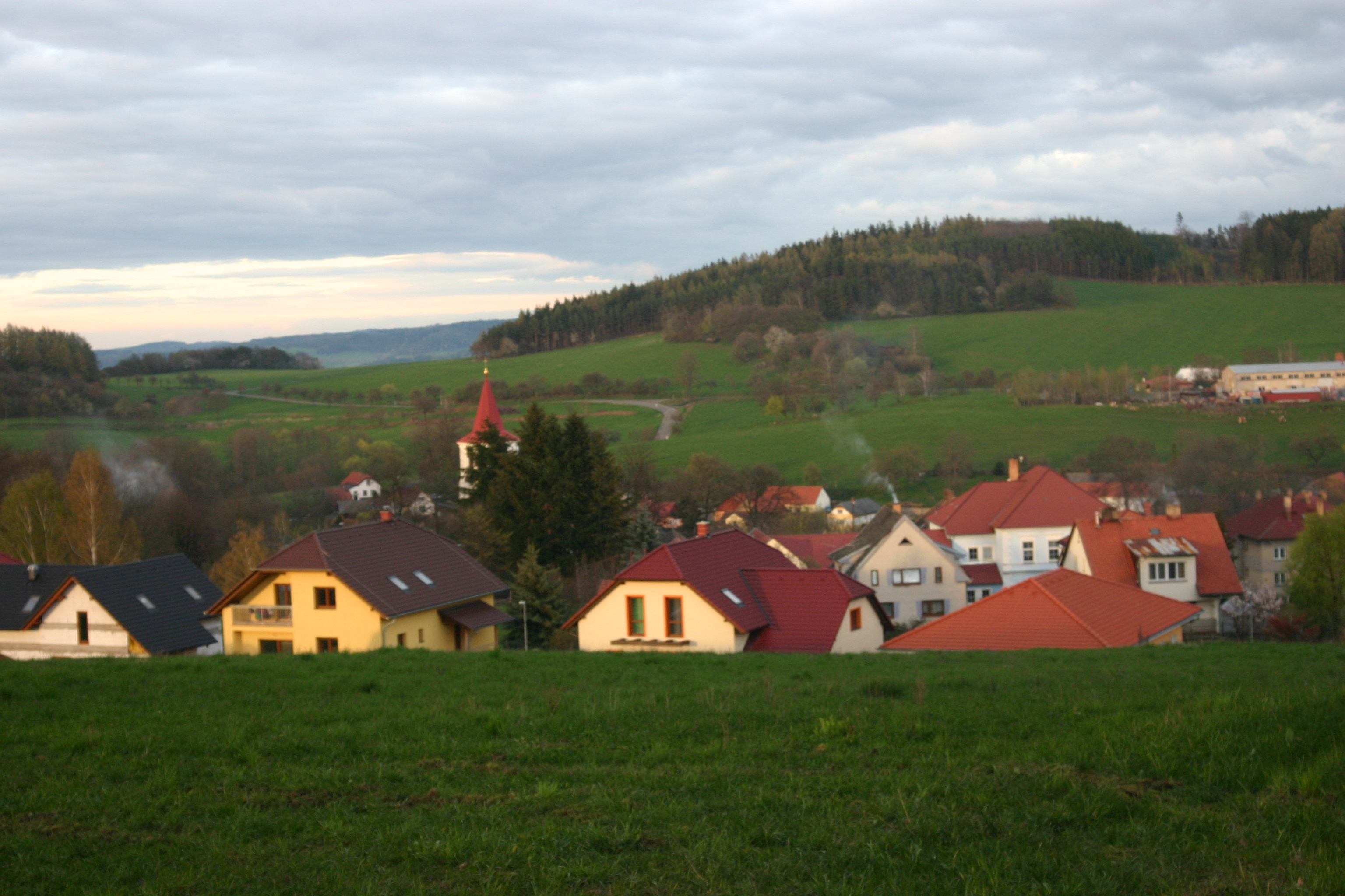 Obec Nechvalice z nedalekého kopce